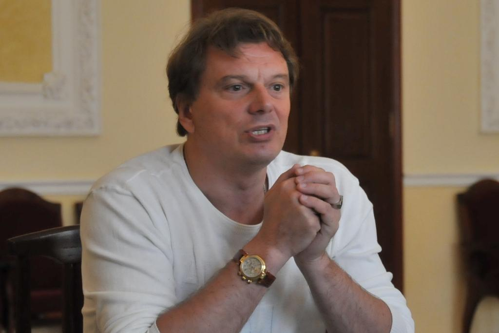 Юрий Васильев